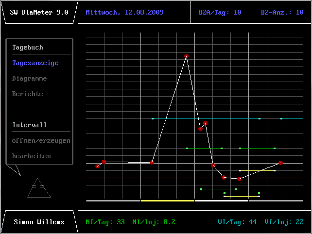 Dieses Bild zeigt ein Tagesanzeigendiagramm in SW DiaMeter Version 9.0, welches eine Blutzuckerkurve, Broteinheiten und Insulinspritzungen von einem Tag anzeigt.